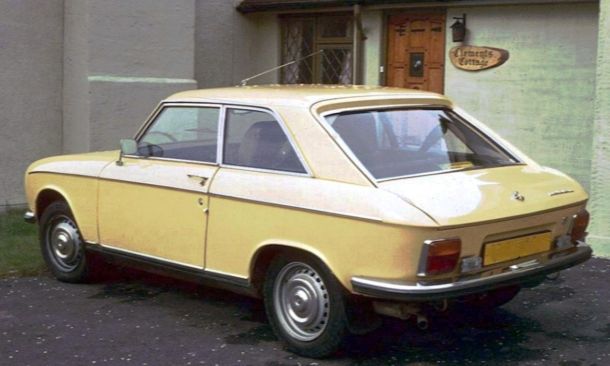 Peugeot 304 coupe en Angleterre